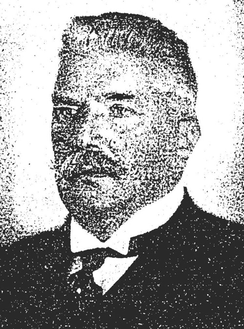 Josef Mathias Petersmann (1864–1942), deutscher Verleger und Unternehmer